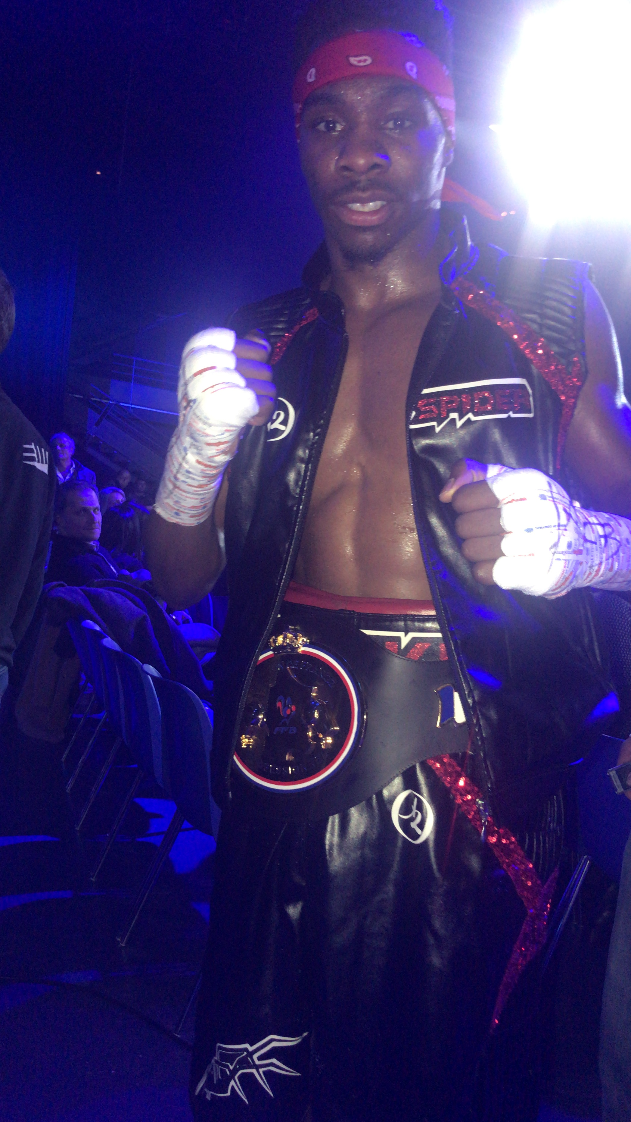 Palais des Sports de Paris le 9 février 2019, victoire du champion de France des coq, Elie Konki qui bat aux points Anthony Chapat.